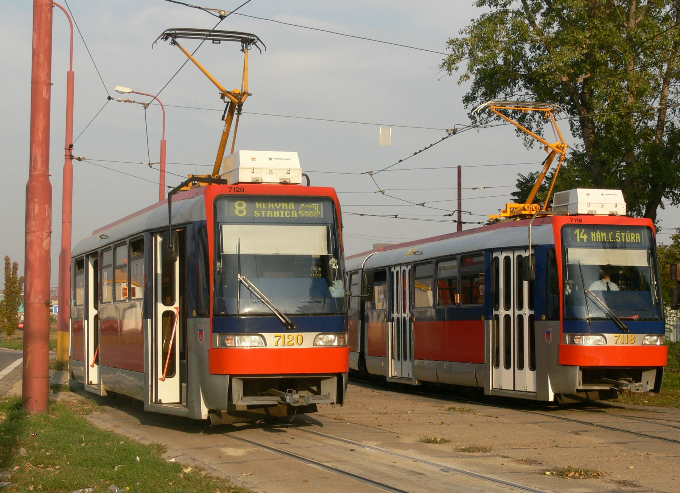 K2S, Astronomicka, Bratislava